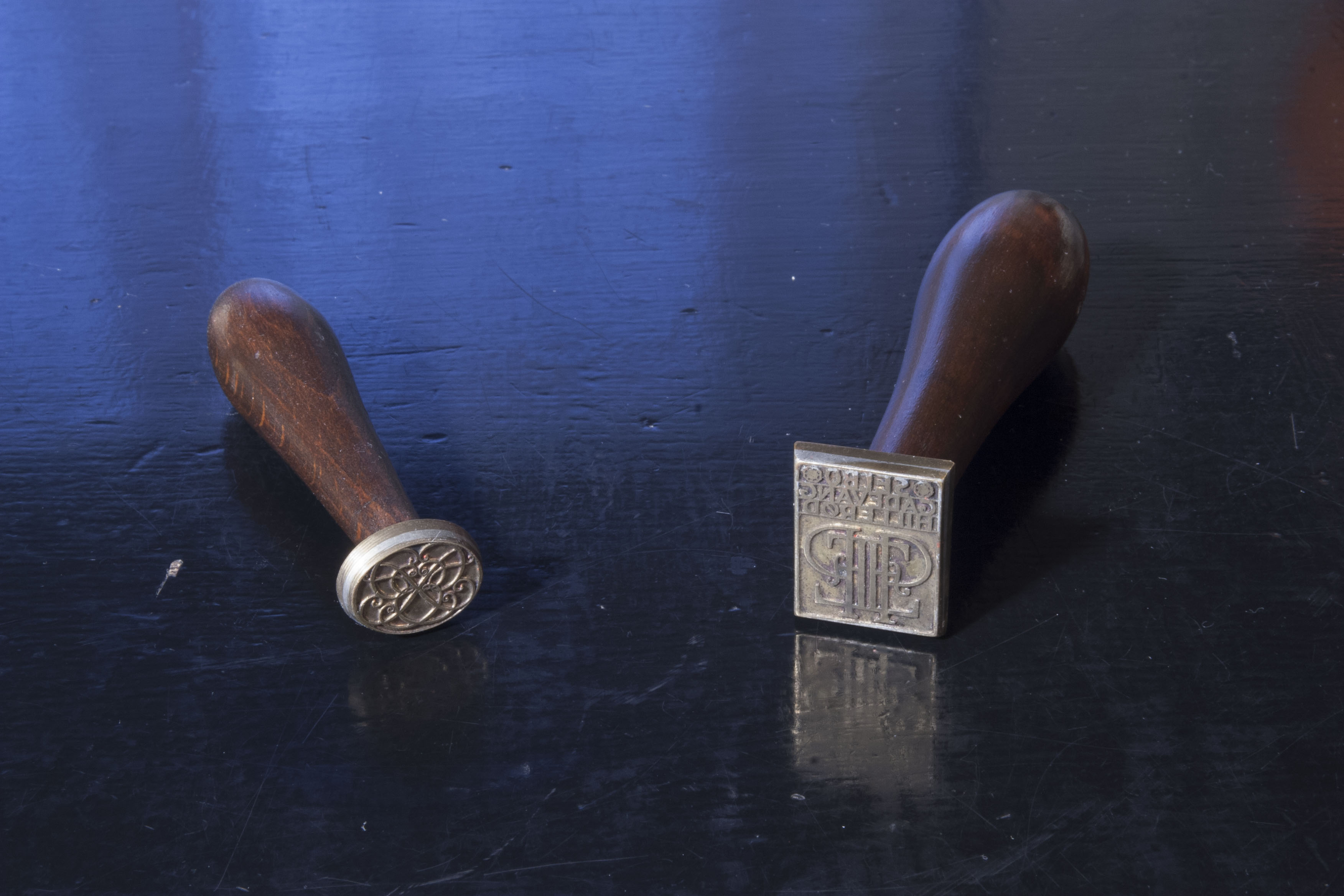 Et par signeter på træhåndtag.